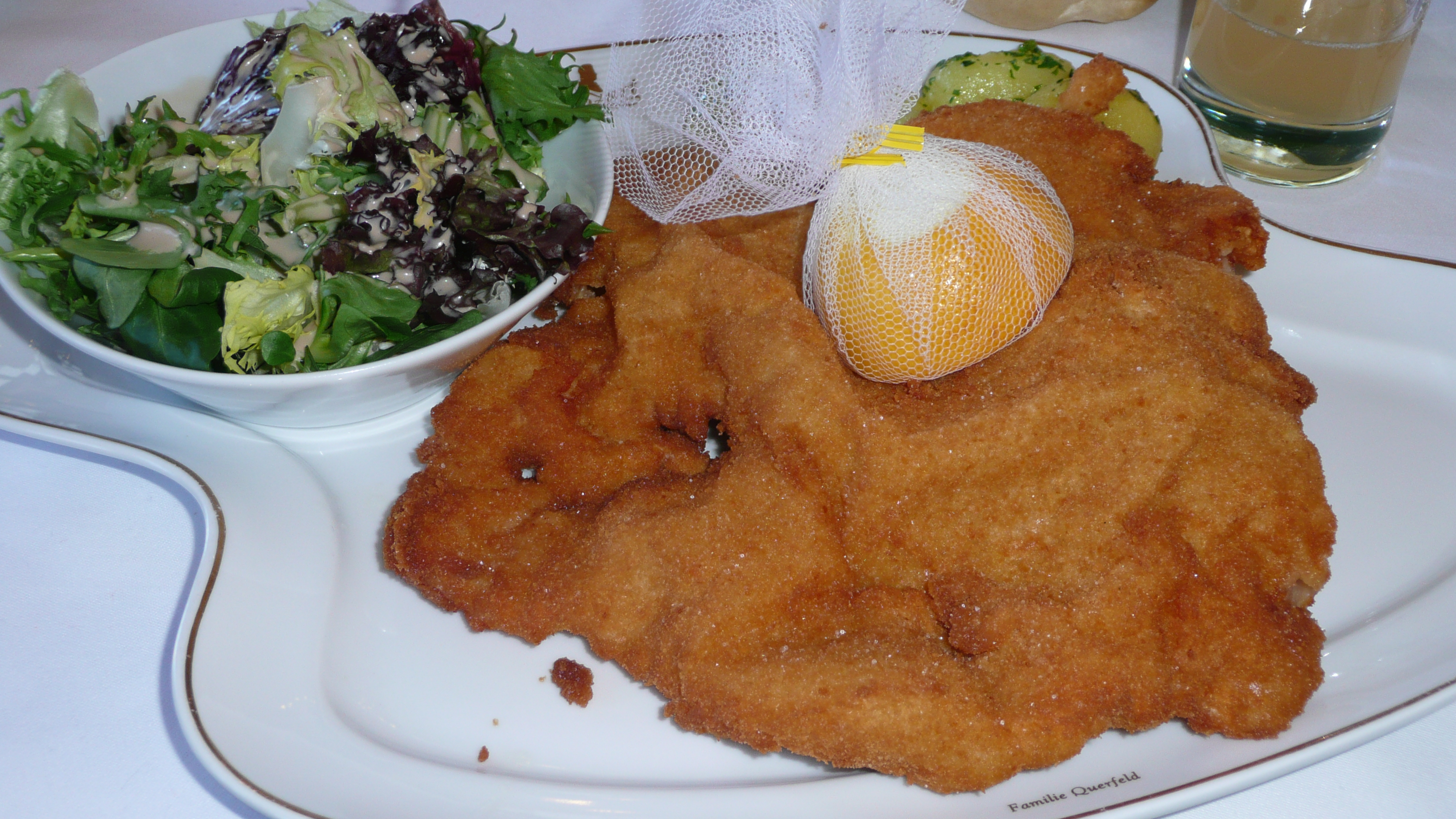 Wiener Schnitzel im Cafe Mozart in Wien